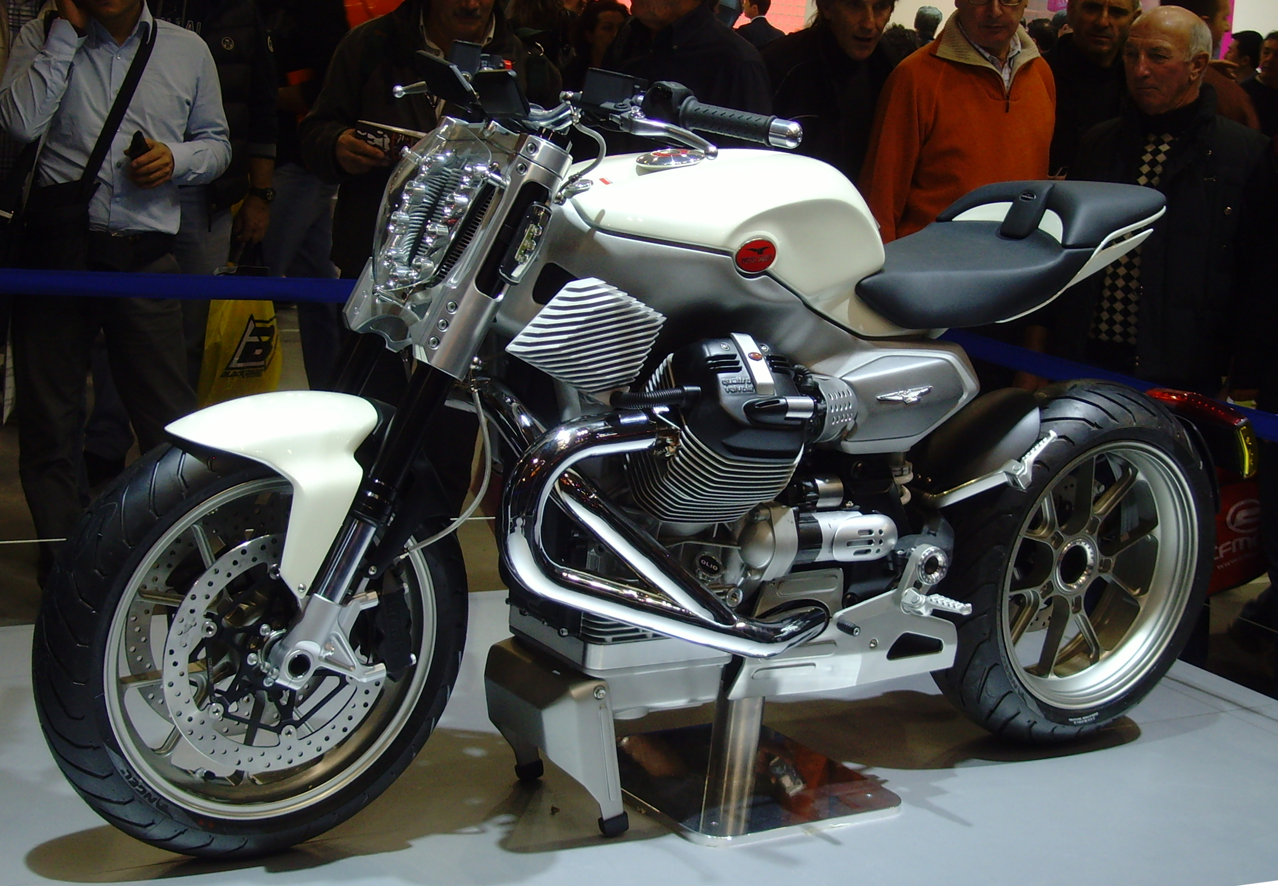 EICMA Milano 2009 - Moto Guzzi V12 X. Samsung NV3, Samsung VLUU NV3